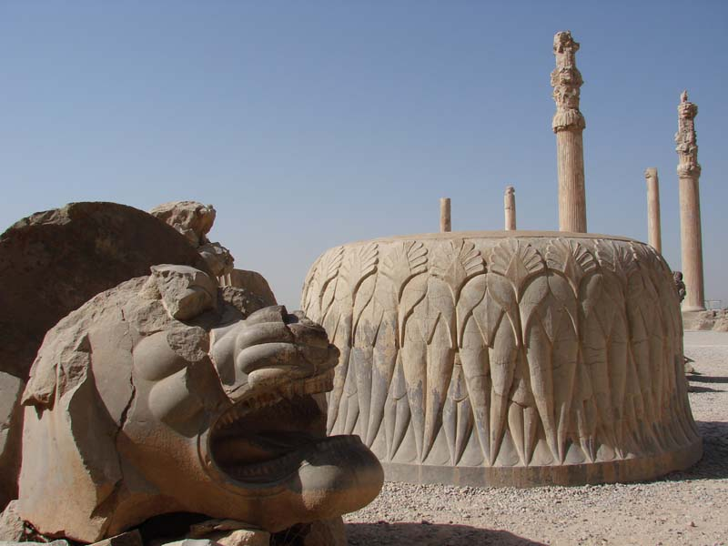 sculpture d'un lion a persepolis